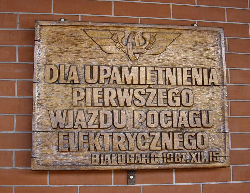 Białogard, dworzec kolejowy. Tablica pamiątkowa.